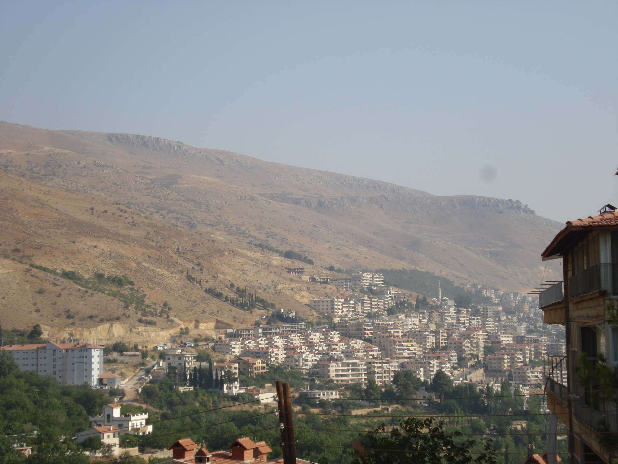 منظر لأحد أجزاء بلدة الزبداني قرب دمشق